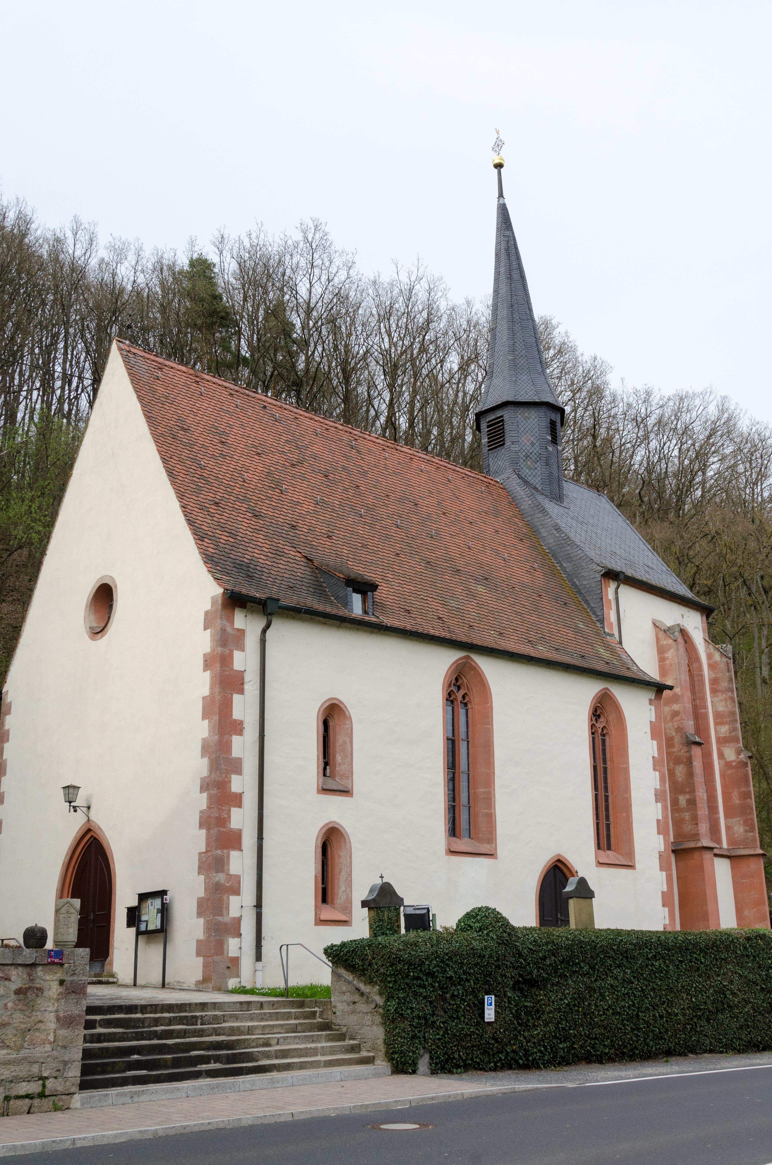 Niederlauer, Unterebersbach, Katholische Pfarrkirche Mariae Verkündigung